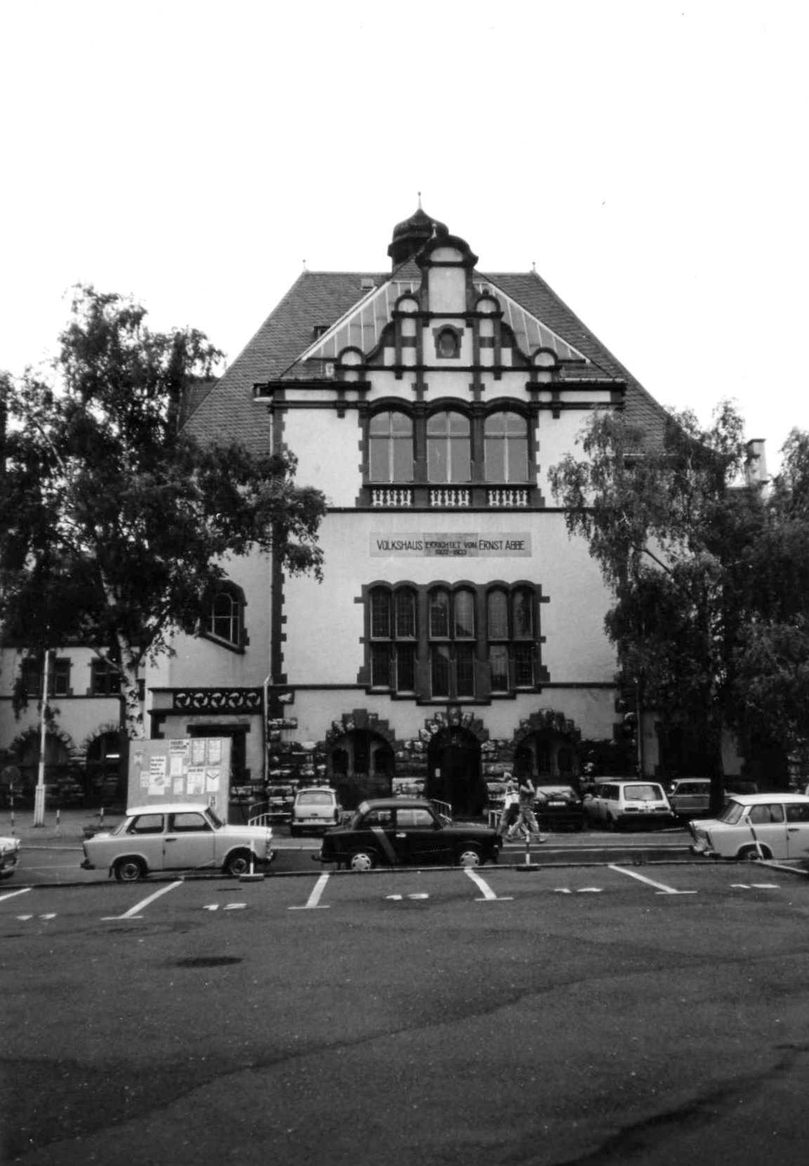 Ernst Abbe Volkshaus